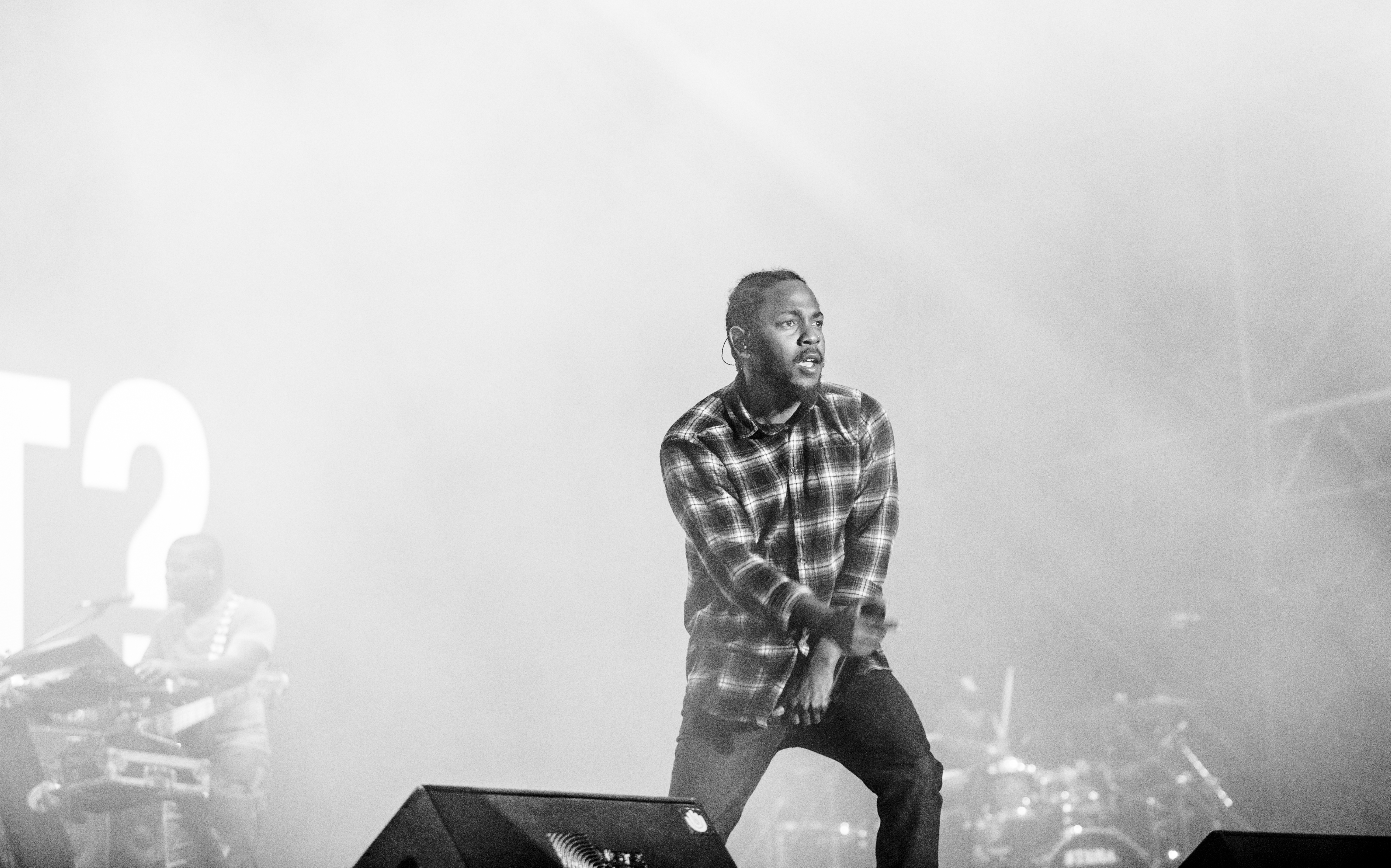 F.I.B. 2016